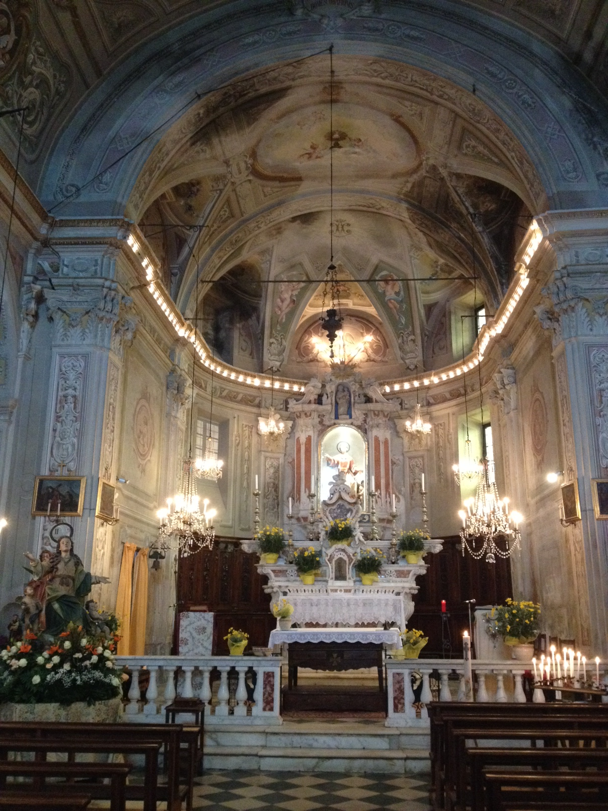 Chiesa Parrocchiale di san Lorenzo a Orco (SV) - Italy